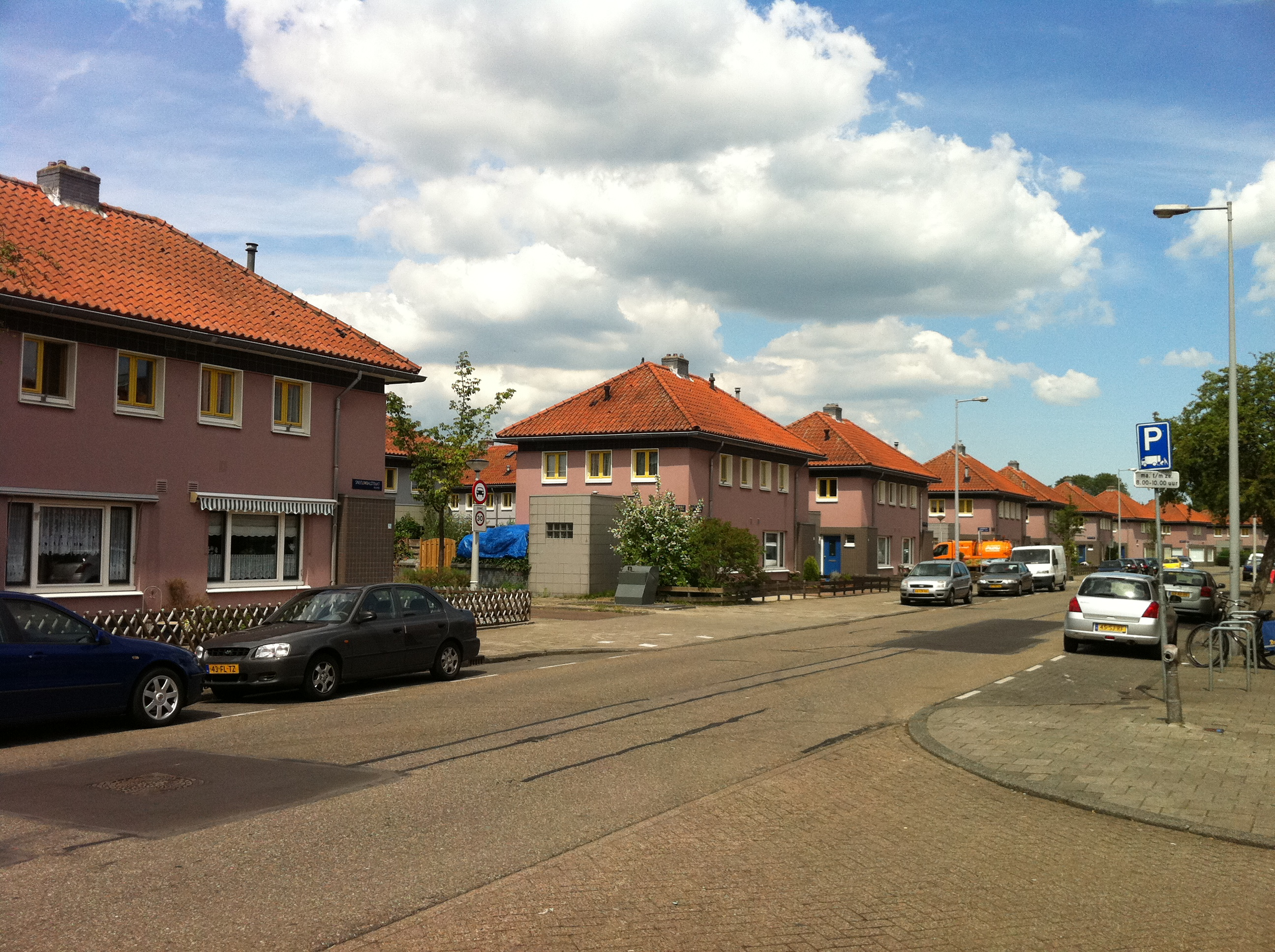 Floradorp te Amsterdam-Noord, ten noorden van de Sneeuwbalstraat. Ontworpen als deel van Tuindorp Buiksloterham, woningbouw tussen 1917 en 1930 in de Buiksloterhampolder.